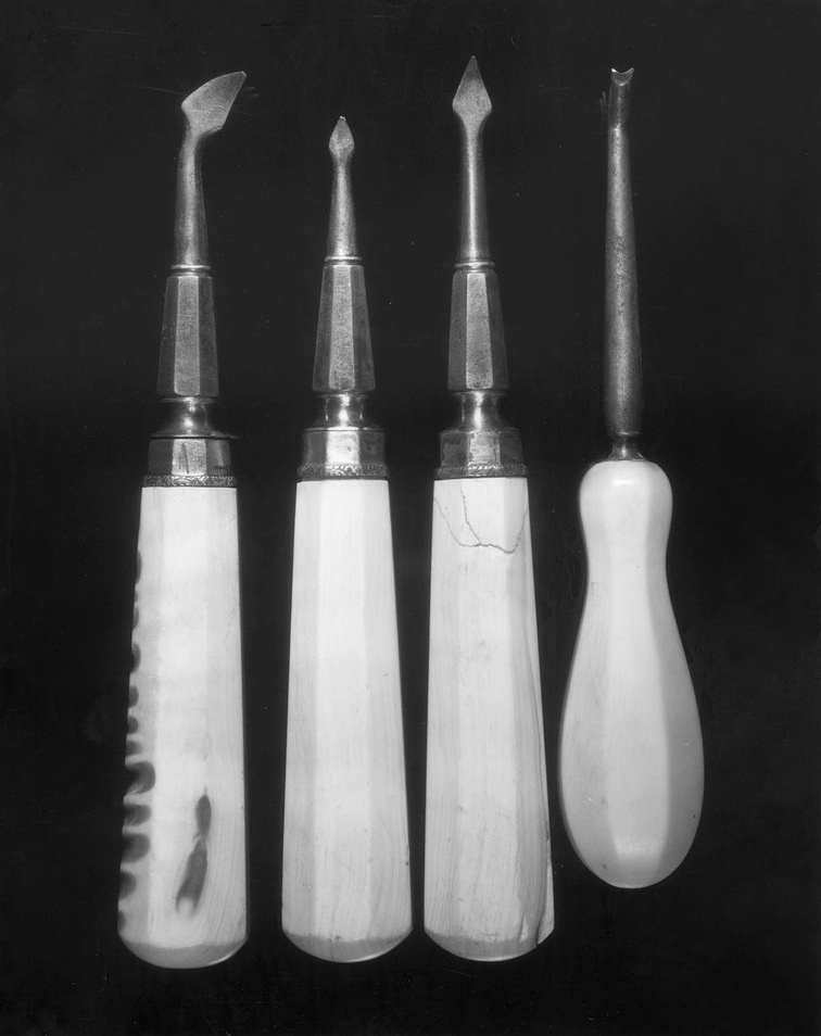 Paul Revere's dental tools.